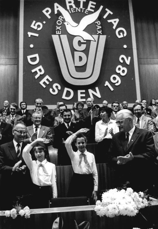 ADN-ZB Reiche-15.10.82-ri-Dresden: 15. CDU-Parteitag - Eine Delegation der Pionierorganisation "Ernst Thälmann" entbot den Delegierten am letzten Beratungstag einen herzlichen Gruß. Der Parteivorsitzende Gerald Götting (r) und sein Stellvertreter Wolfgang Heyl (l) sowie die Mitglieder der CDU dankten mit herzlichem Beifall."